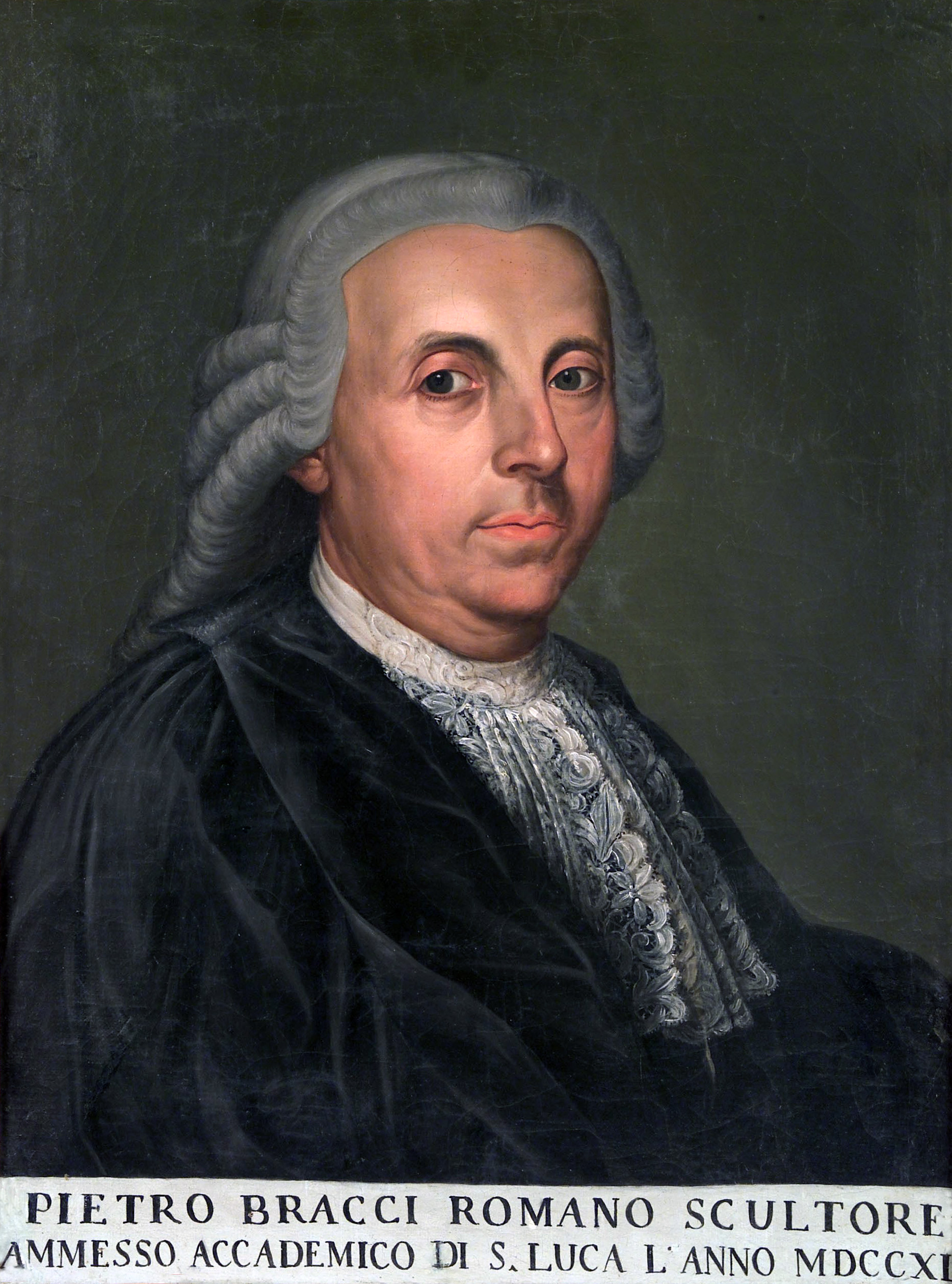 Pietro Bracci, Accademia Nazionale di San Luca, olio su tela, autore anonimo, cm. 49,5 x 60,5